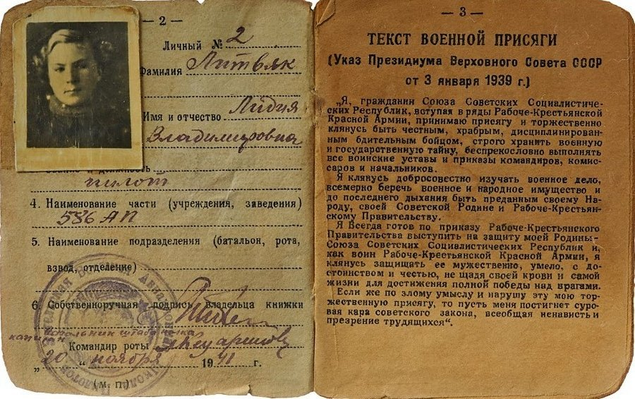 Красноармейская книжка Лидия Владимировна Литвяк